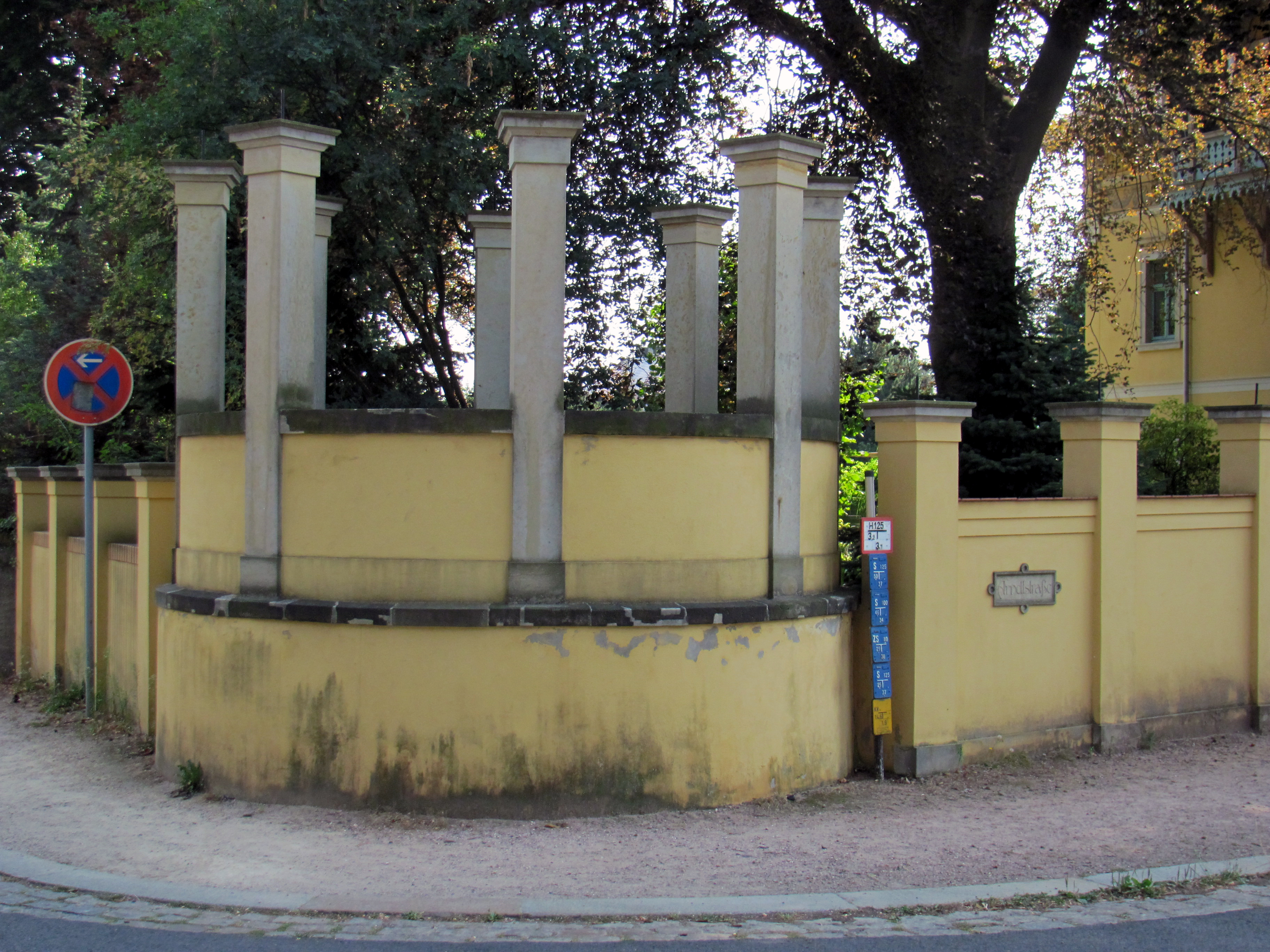 Radebeul-Serkowitz, Geschäftslokal Gebrüder Ziller, Grundstücksecke, rechts unterhalb des Eckpavillons befindet sich in der Einfriedung ein Straßenschild "Arndtstraße" aus Sandstein